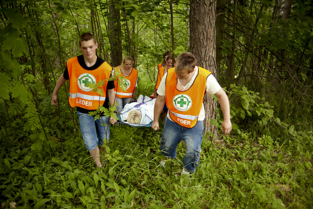 Norsk Folkehjelp Ungdom øver på førstehjelp under sommerleieren på Utøya. Foto: Asle Huse